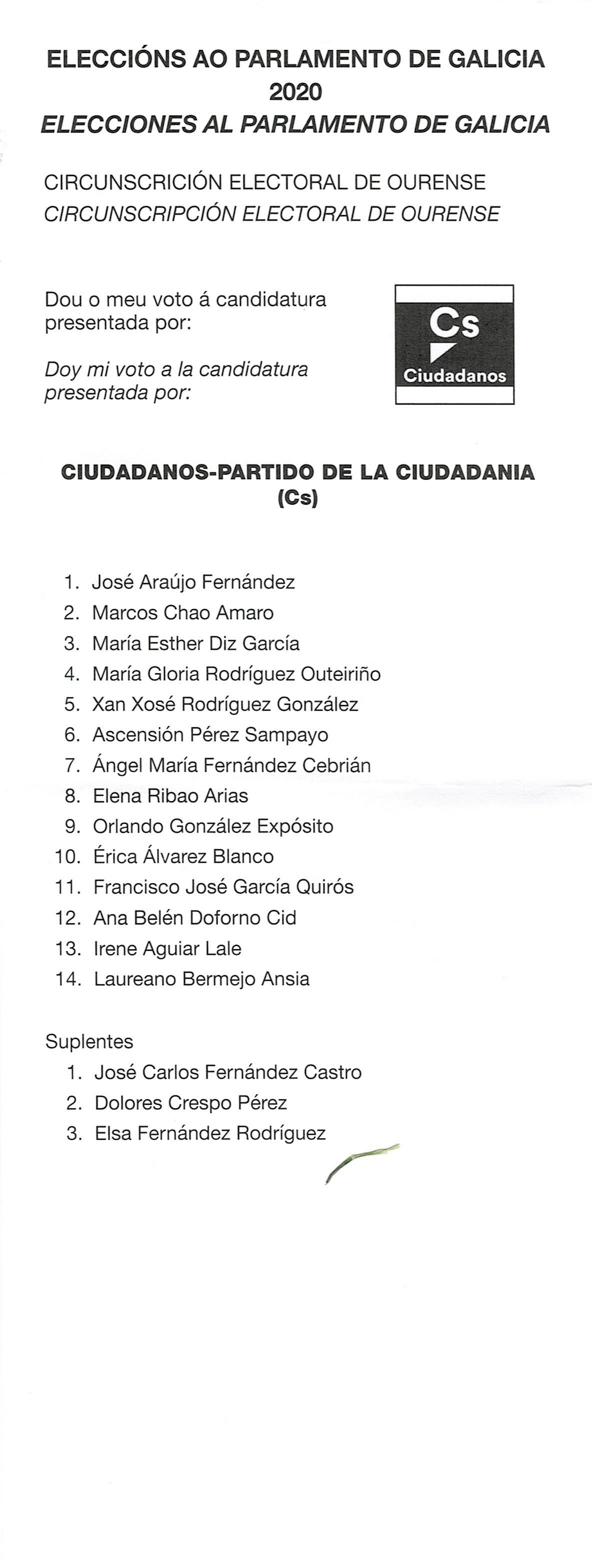 Papeletas electorais Eleccións ao Parlamento de Galicia 2020 pospostas circunscrición electoral de Ourense-Cs